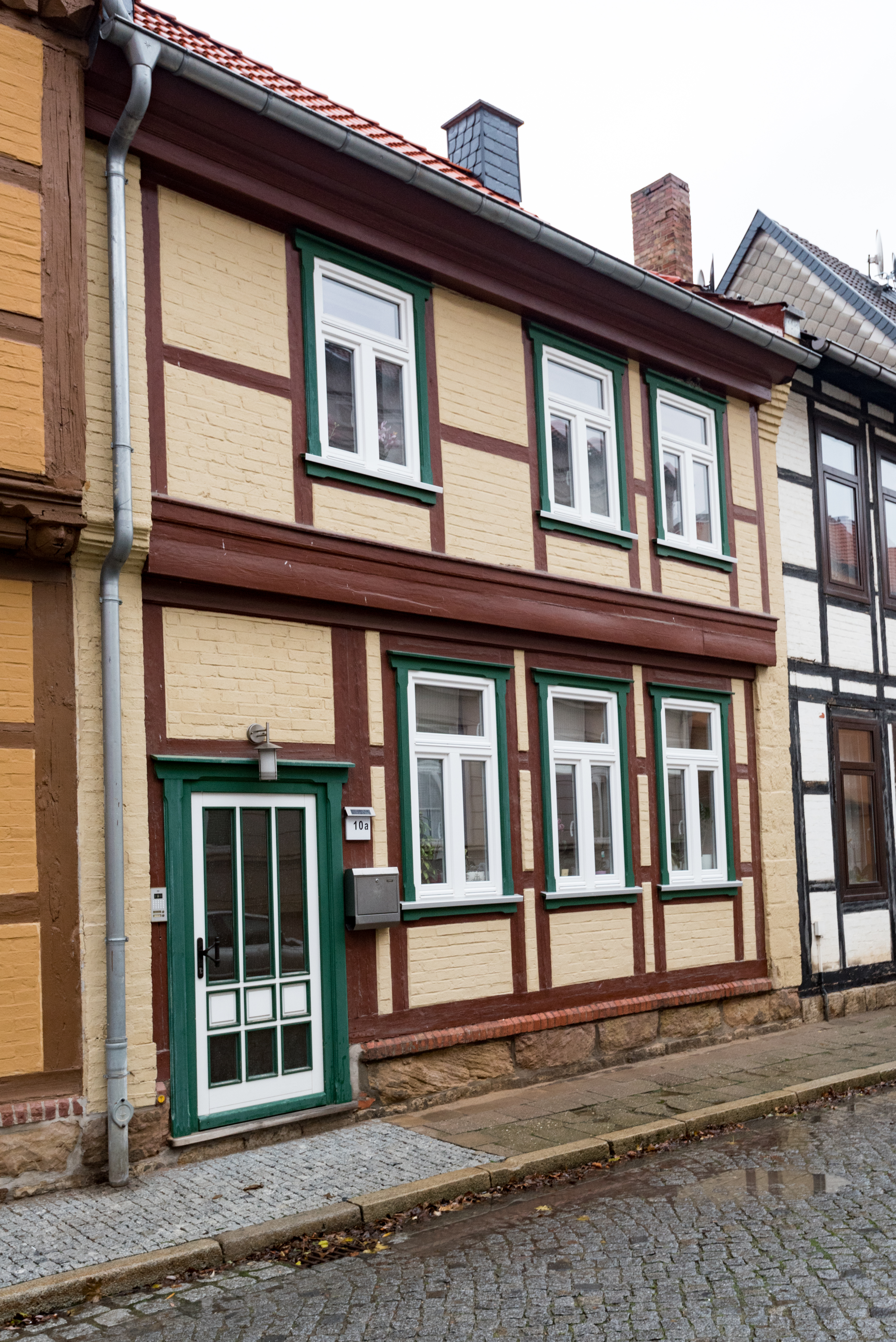 Osterwieck, Am Markt 10A